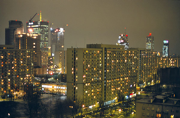 Osiedle "Za Żelazną Bramą" w Warszawie.